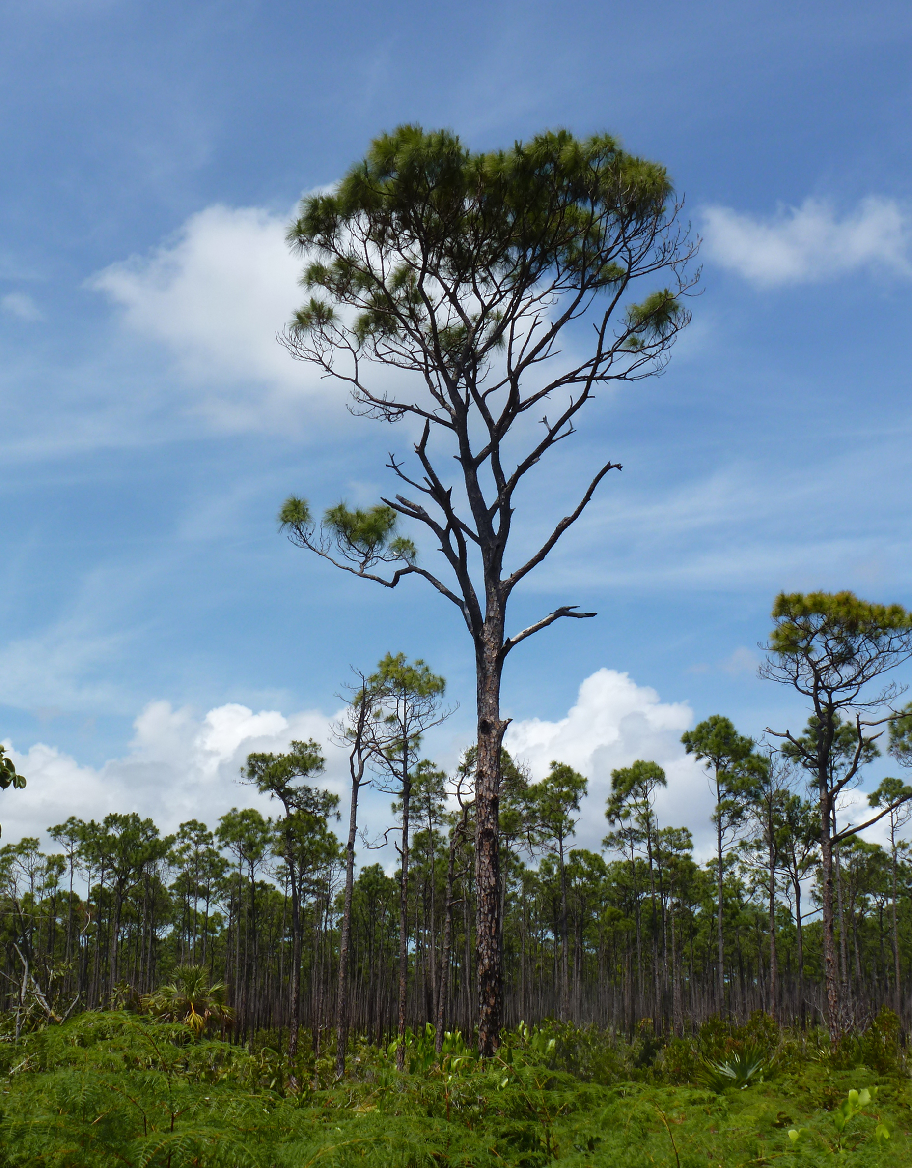 Pinus caribaea var. bahamensis, Lucayan National Park, Bahamas